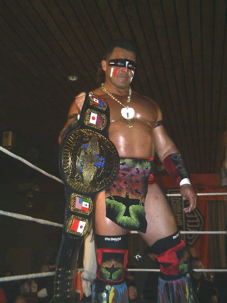 Tatanka in Wittdorf bei der DWA Harley Night VII